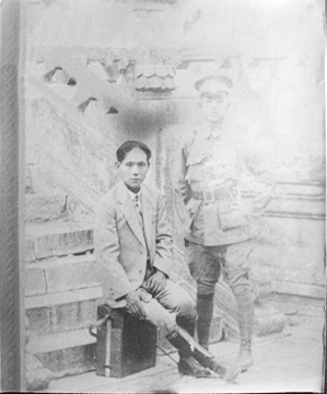 1920年代黄埔一期梁华盛将军与父亲的合影。